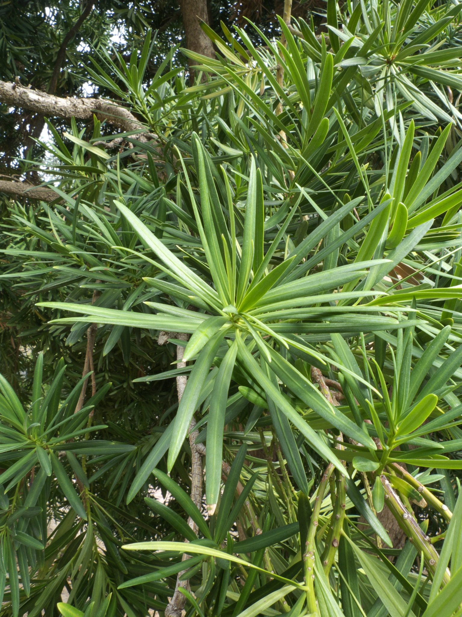 Hojas de Podocarpus neriifolius. Parque del Retiro, Madrid, España.